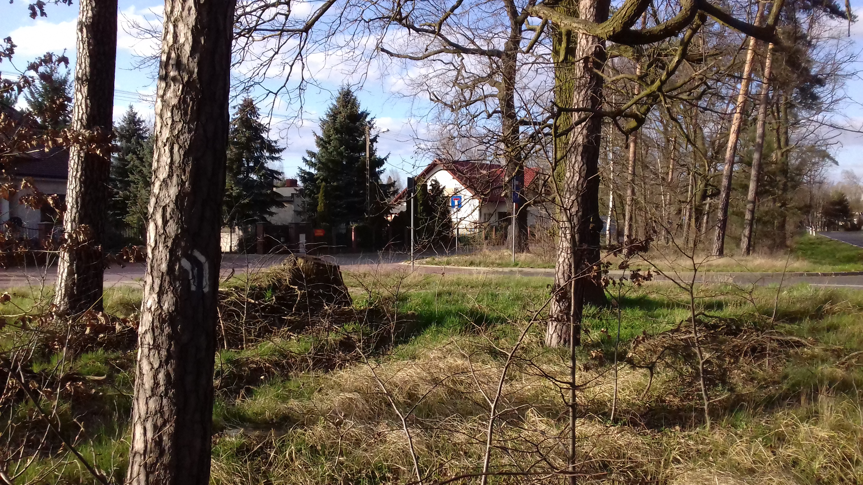 Oznaczenie szlaku pieszego nr 3583 (niebieskiego) na obrzeżach Pecnej